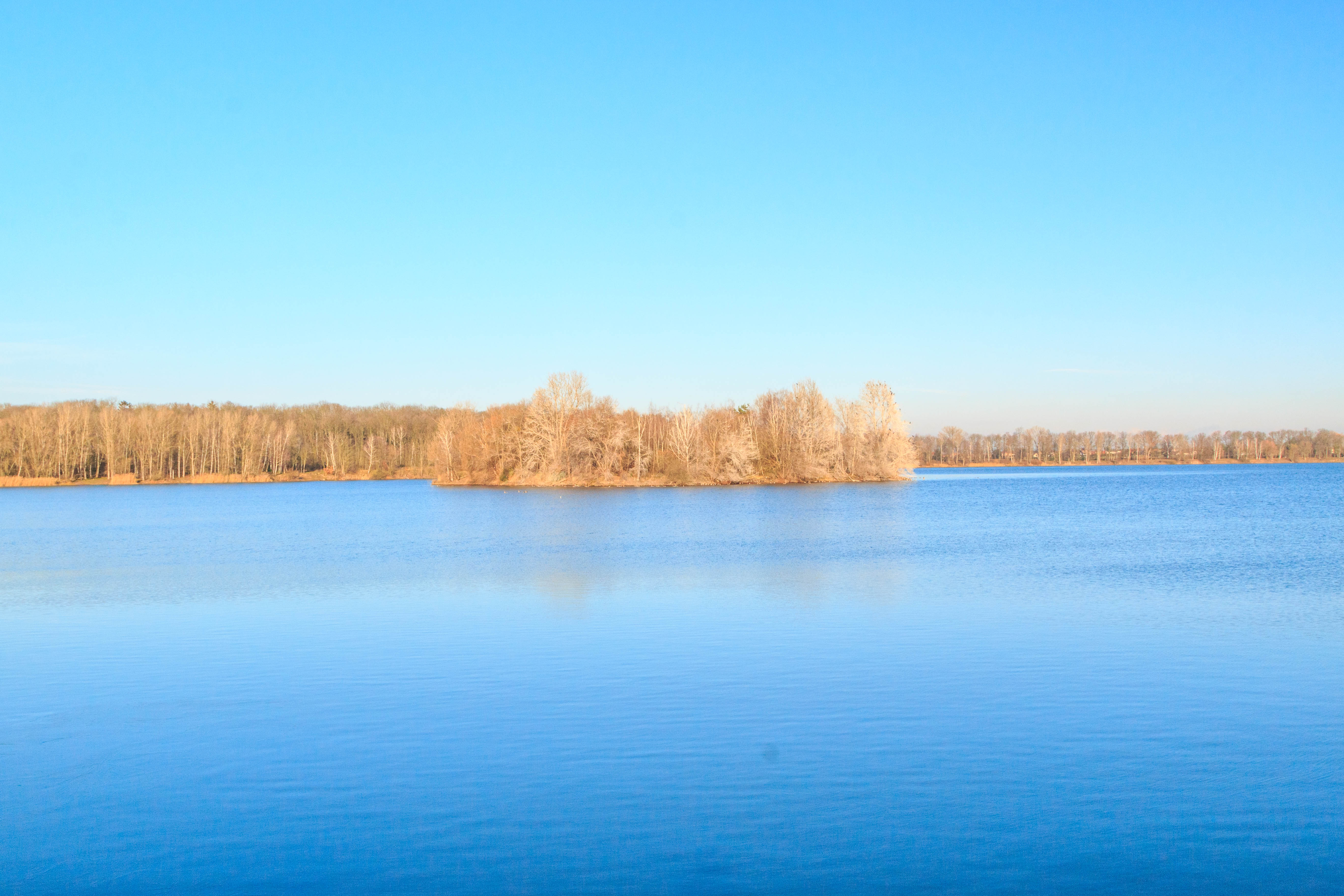 písník Oplatil I Project: Vodstvo.